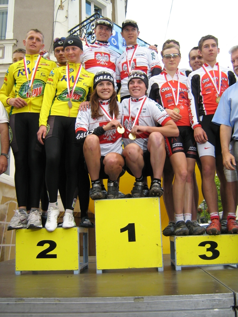 Mistrzostwa Polski MTB 2007 - sztafeta1. Halls Professional MTB Team 44.57 (Dariusz Batek, Kornel Osicki, Maja Włoszczowska, Marcin Karczyński),2. RMF FM Mountain Dew Kraków 48.44 (Piotr Sułek, Łukasz Osiecki, Marta Sułek, Adrian Rzeszutko),3. Adventure Asepta Kenda Łódź 49.30 (Jacek Trzop, Debora Jaworska, Emanuel Piaskowy, Paweł Harkot)